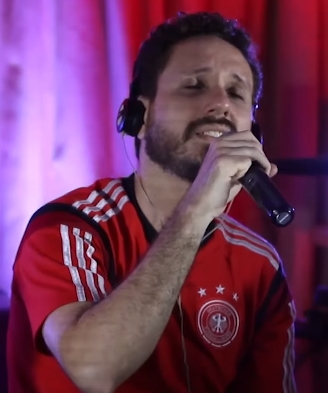 Leonardo Gonçalves na rádio Melodia, em abril de 2015